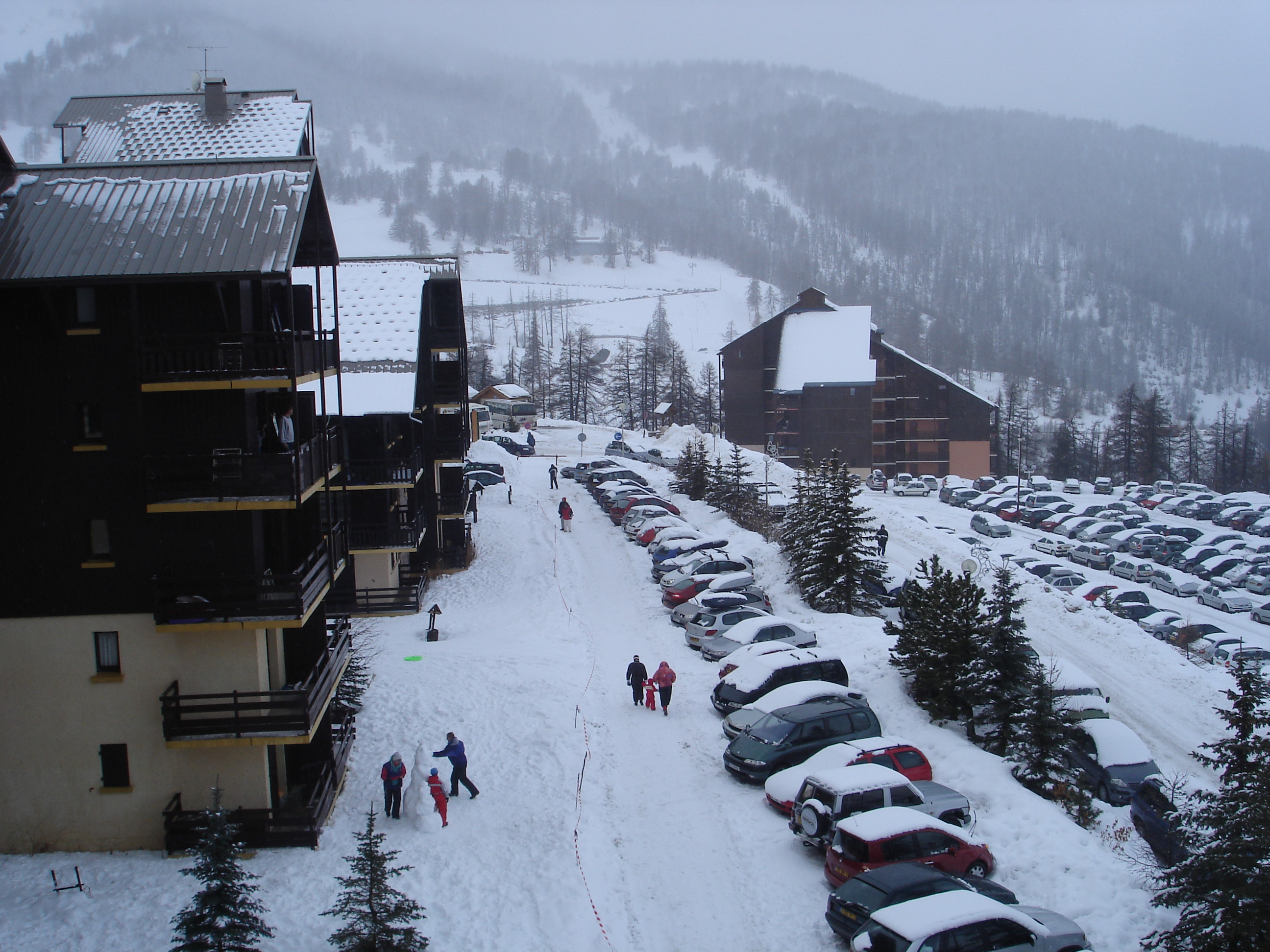 (Ville de Risoul-Hautes-Alpes) Auteur : Jean-Claude Perez